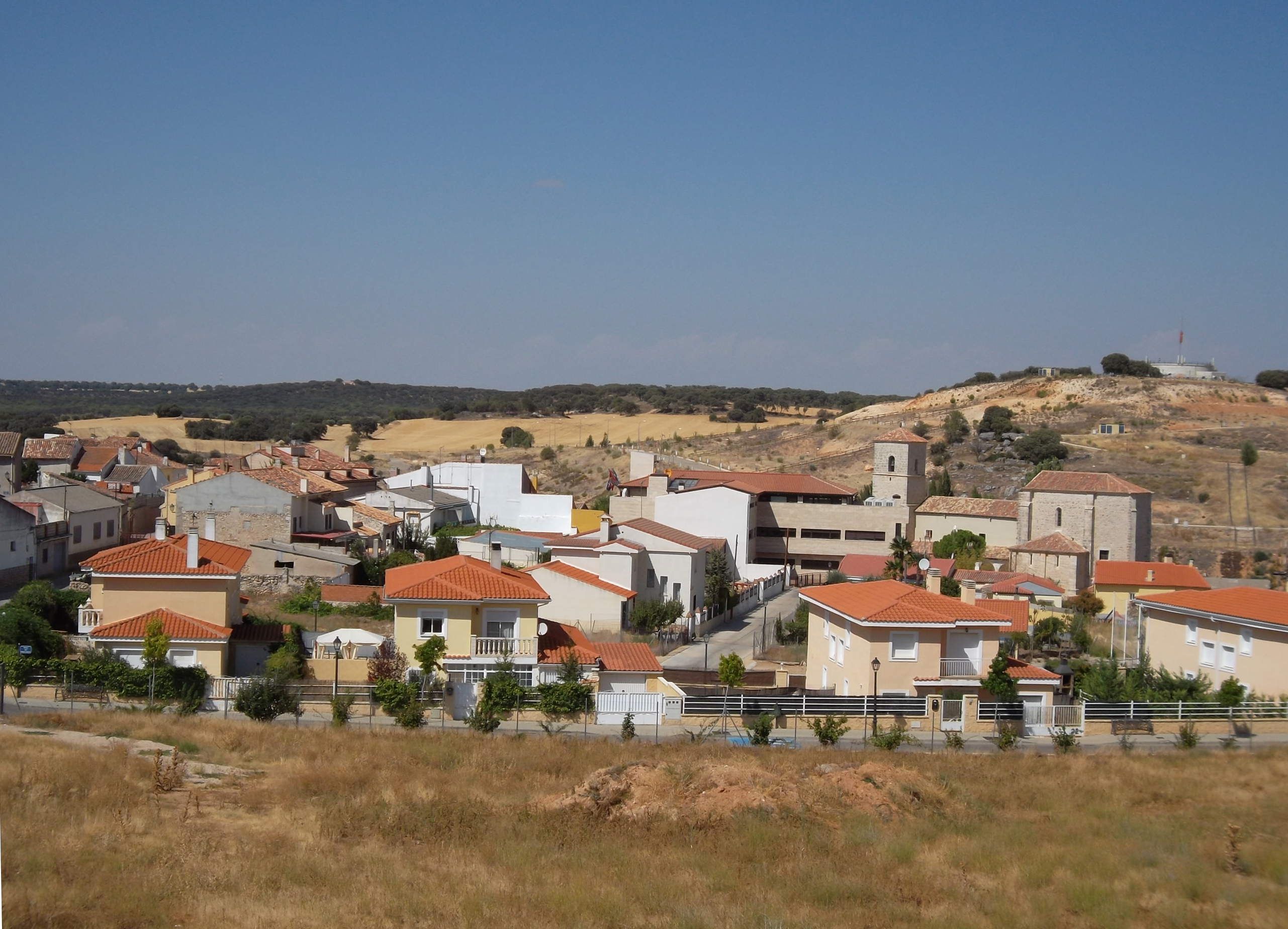 Yebes - Una vista parcial del pueblo.